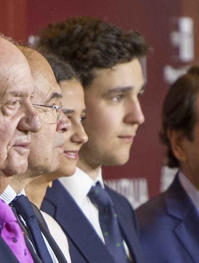 Presentación de los carteles de la feria taurina de San Isidro